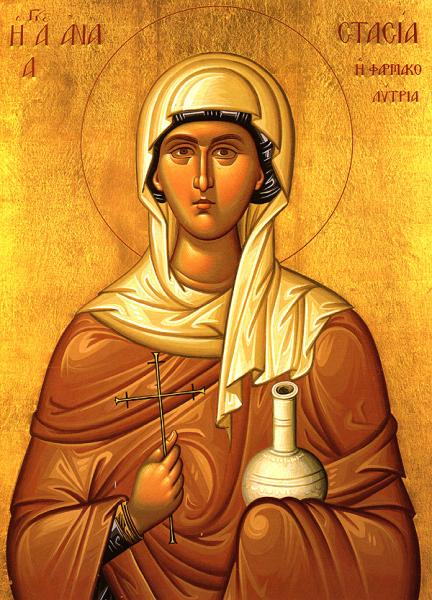 Saint Anastasia (ortodox icon)